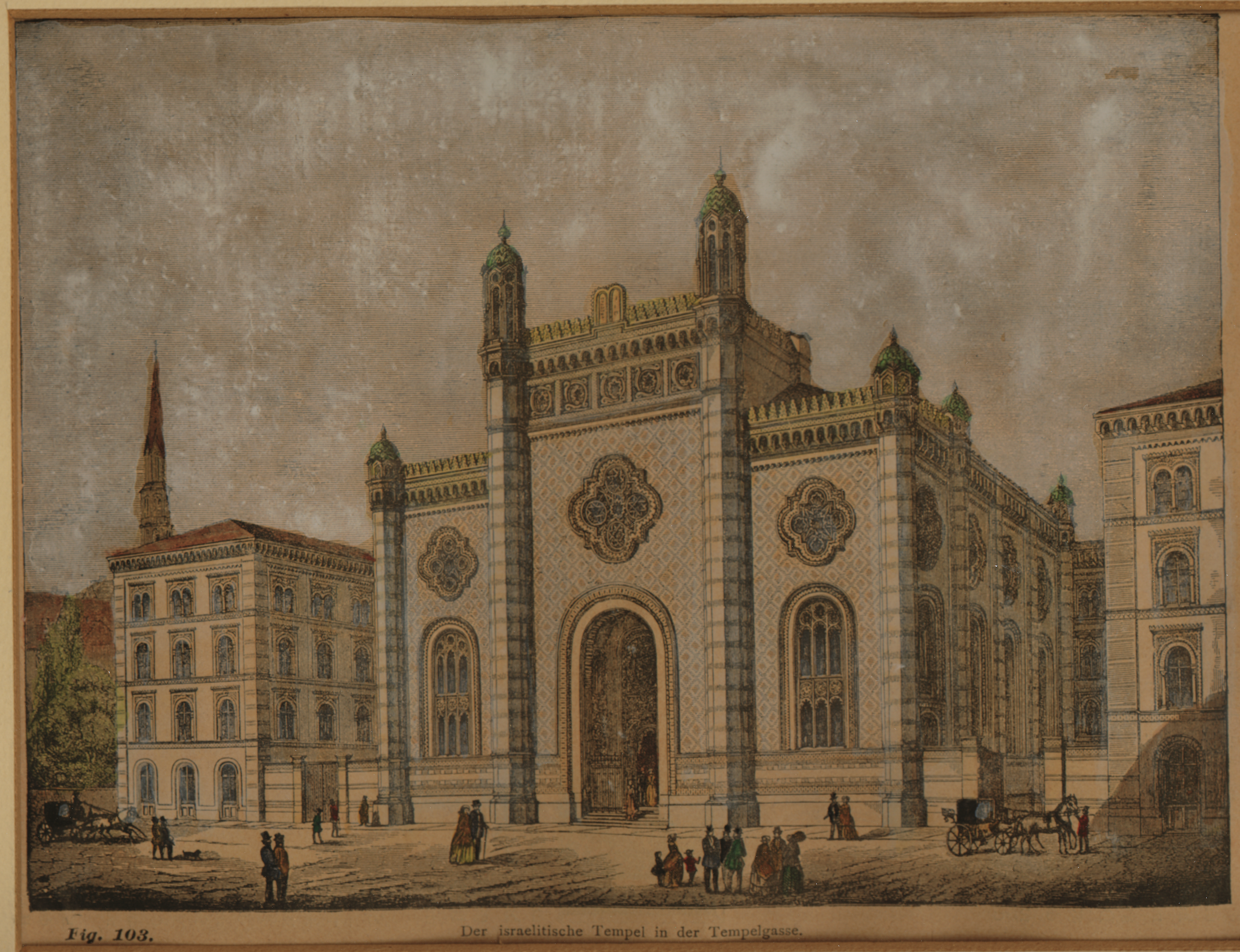 Leopoldstädter Tempel, Der israelitische Tempel in der Tempelgasse